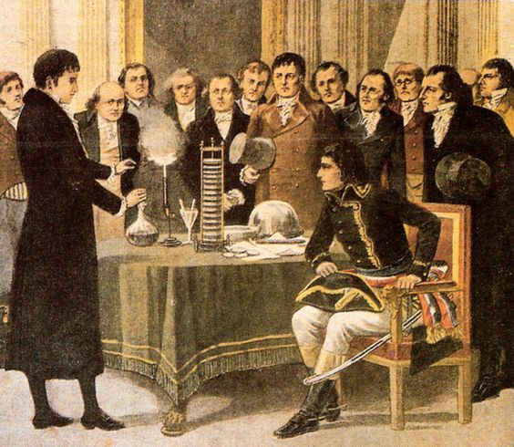 Alessandro Volta présente sa pile électrique à Napoléon en 1801